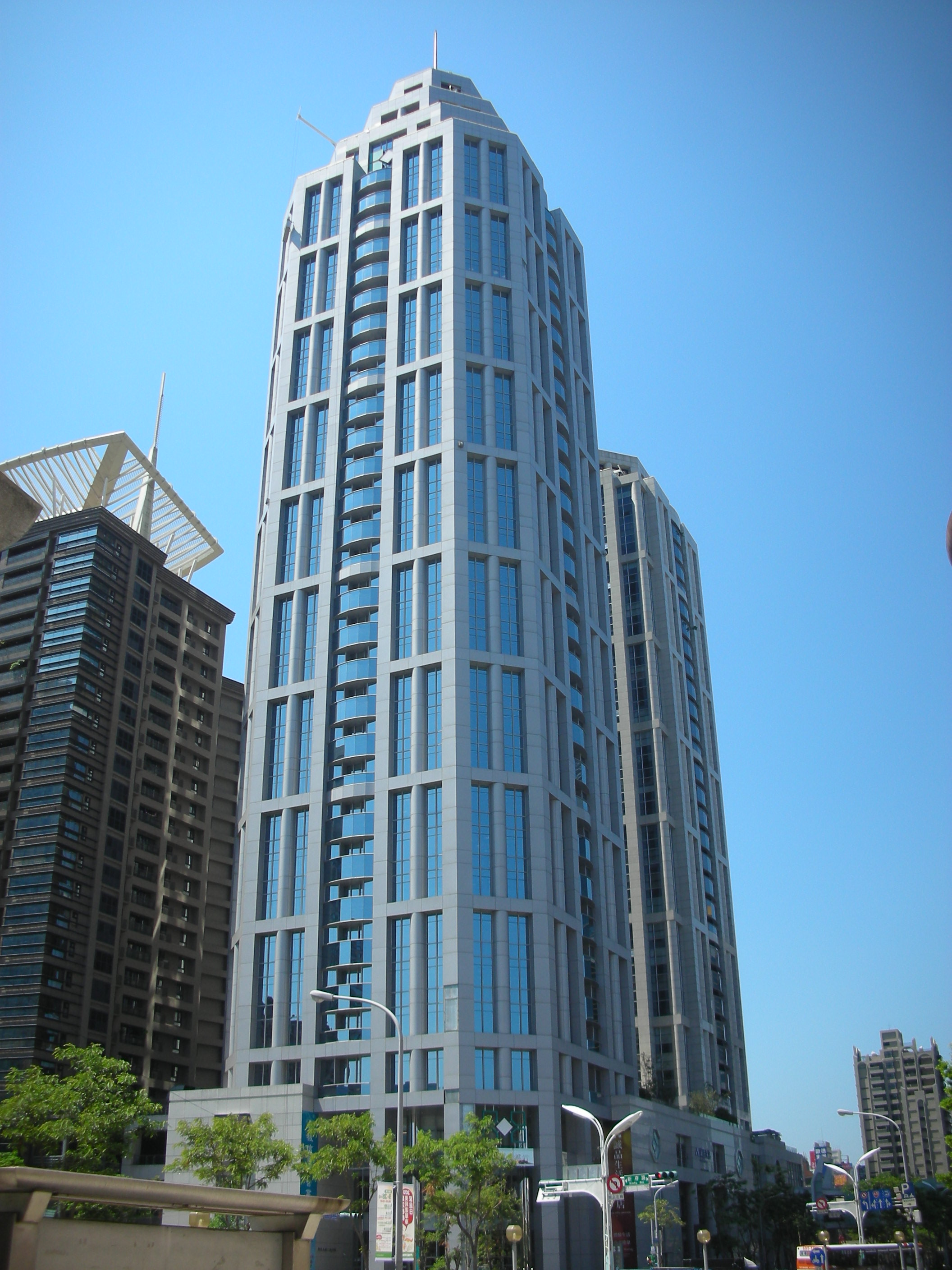 板信雙子星花園廣場，現為板信商業銀行總部所在地。